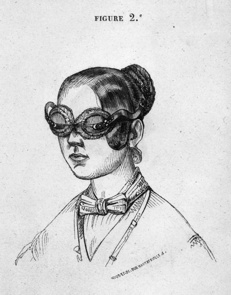 Jaune Sonâmbula